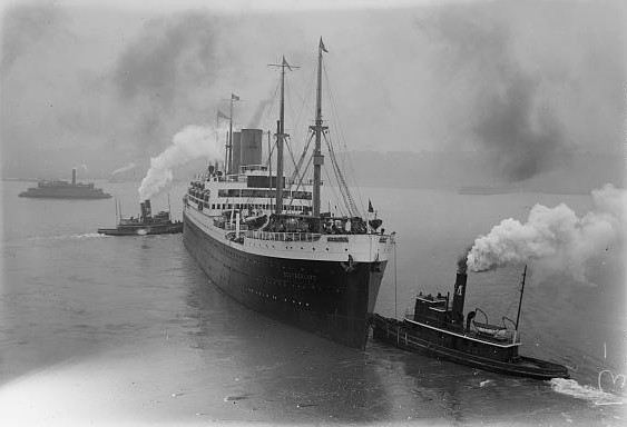 SS Deutschland (Baujahr 1923), zum Ende des Zweiten Weltkrieges 1945 zum Lazarettschiff umgerüstet.